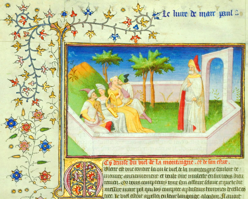 Der Alte vom Berge, Aloadin, gewährt zwei seiner Jünglinge, die als Assassinen rekrutiert wurden, einen Tag in seinem Paradiesgarten in Alamut. Darstellung aus dem Livre des merveilles, einer französischen Abschrift des Reiseberichts von Marco Polo aus dem 15. Jahrhundert. Bibliothèque nationale de France, manuscrits français 2810, fol. 16v.